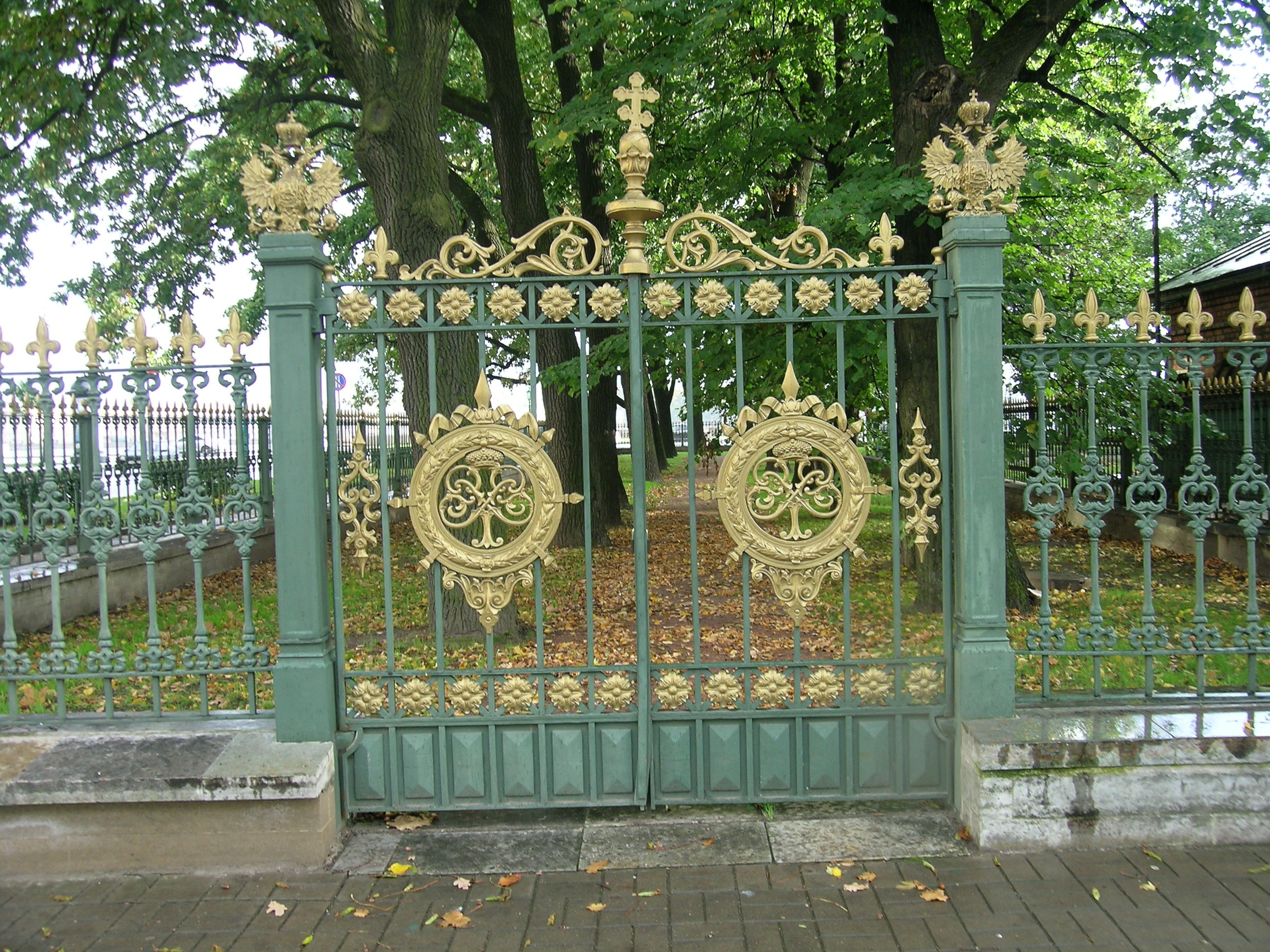 Заборы Санкт-Петербурга